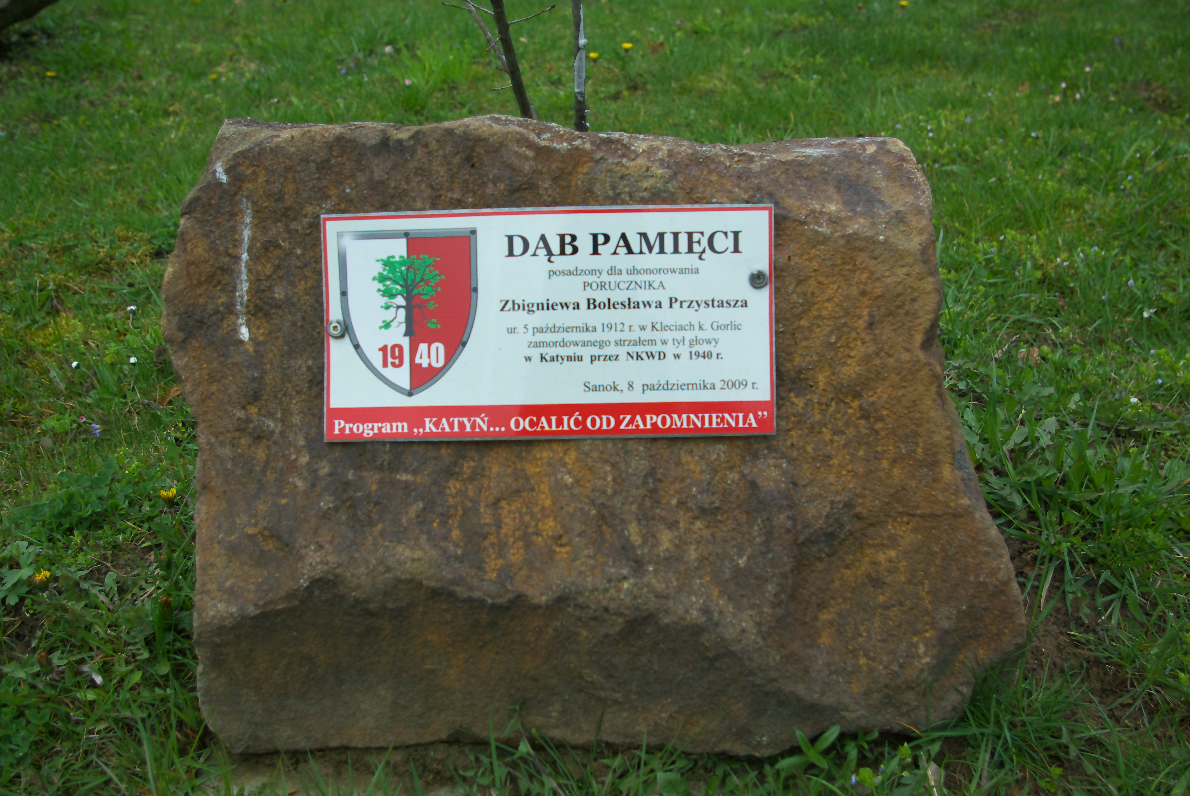 Kamień pamiątkowy przy Dębie Pamięci honorującym Zbigniewa Przystasza na Cmentarzu Centralnym w Sanoku